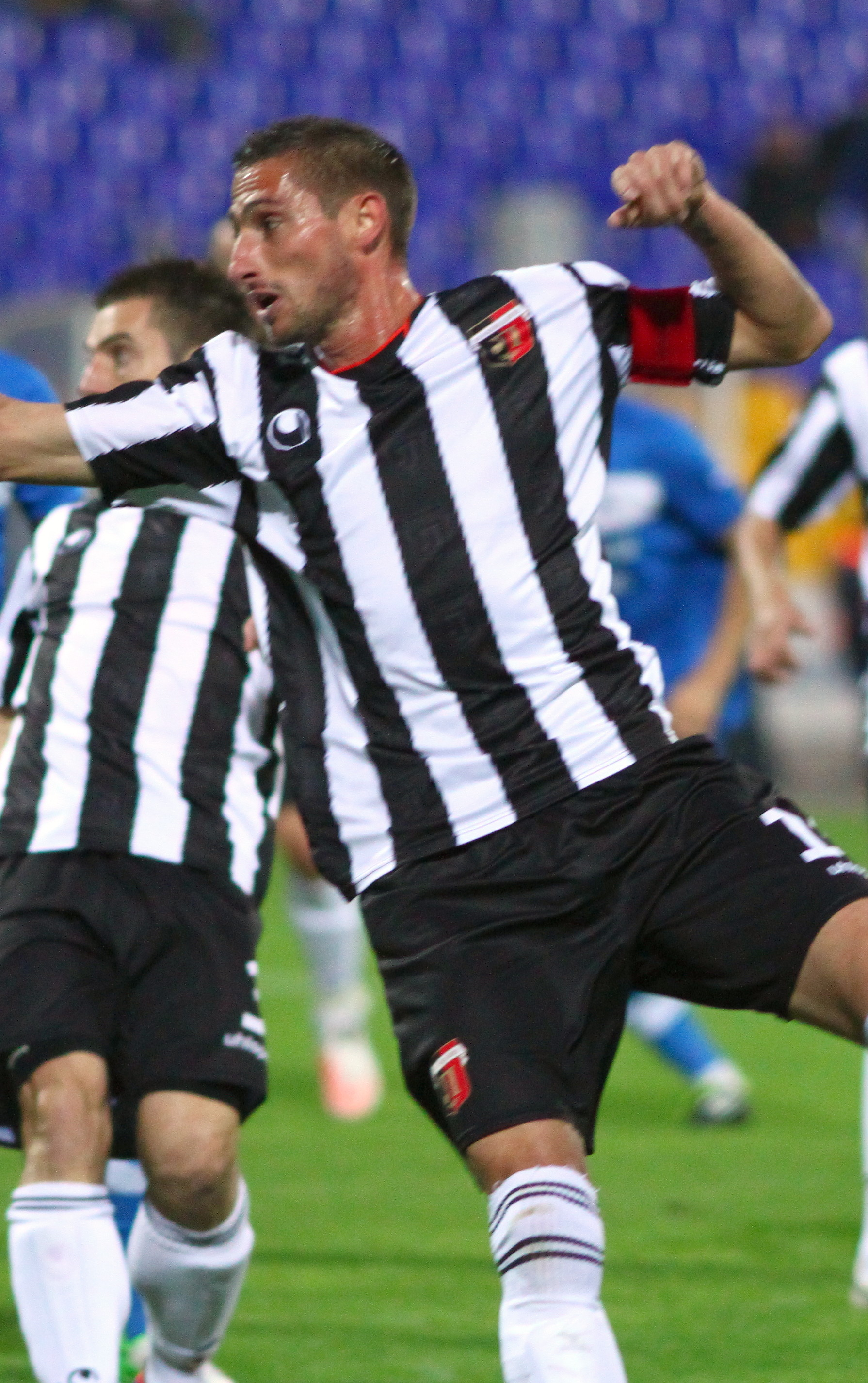 Христо Златински - български футболист, национал, капитан на Локомотив (Пловдив)